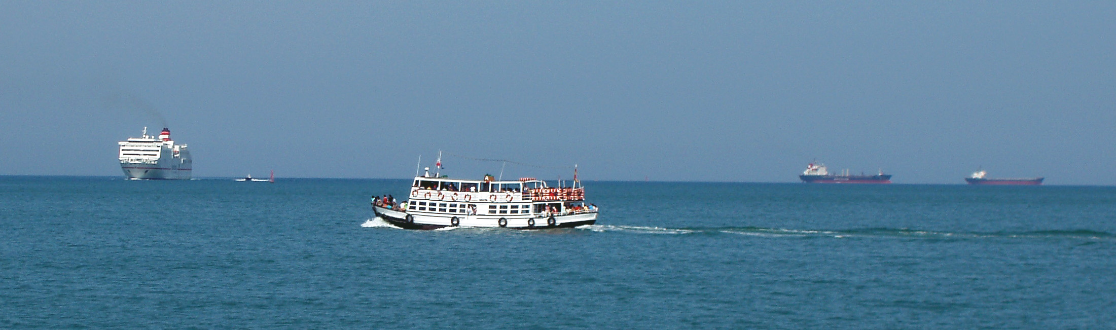 El Vaporcito en la Bahía de Cádiz. Nave declarada Bien de Interés Cultural por la Junta de Andalucía. La fotografía fue tomada desde el catamarán que hace el trayecto El Puerto-Cádiz.